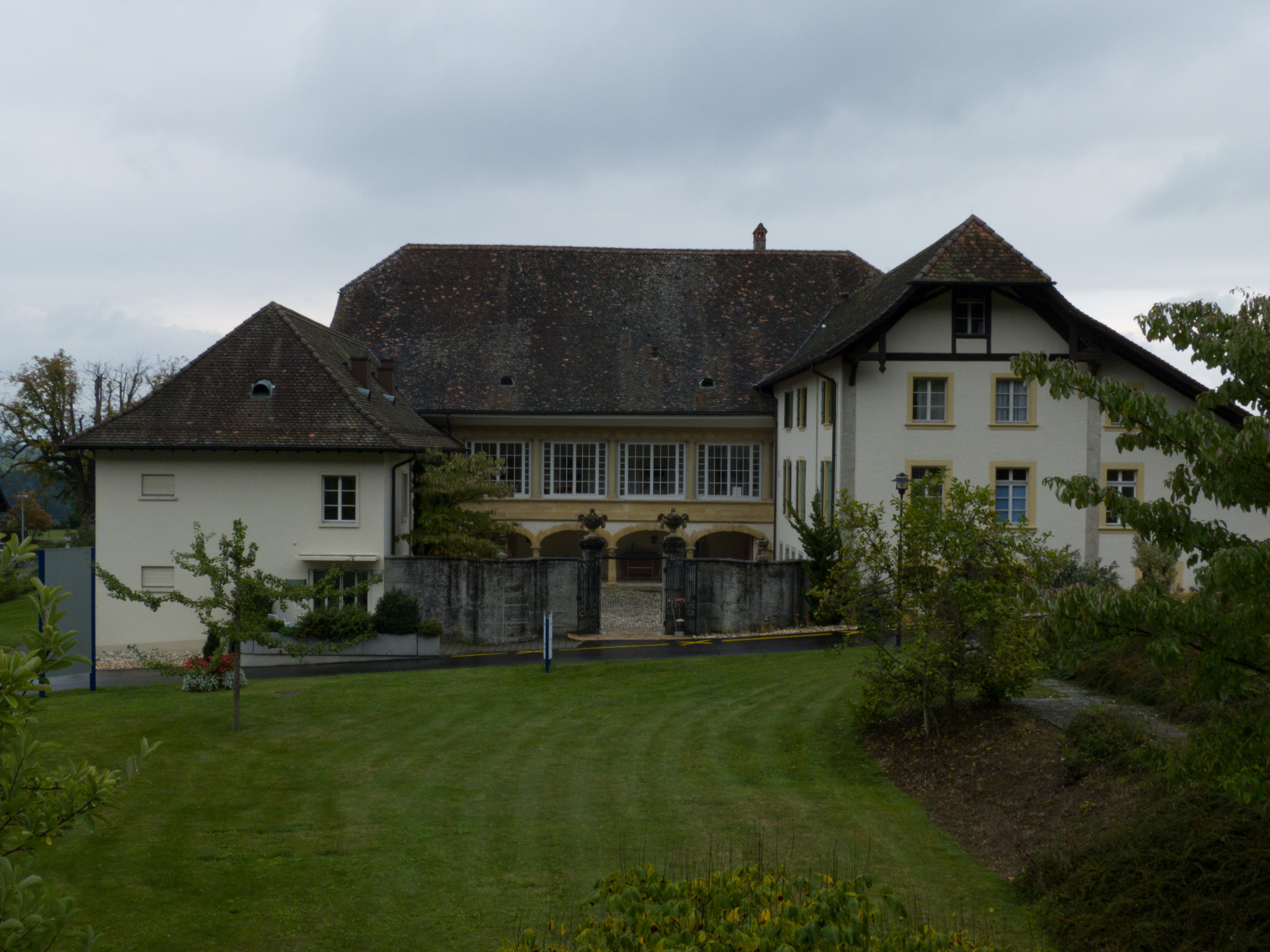 Ehemalige Campagne von Steiger, jetzt Klinik Bethesda. Nordansicht